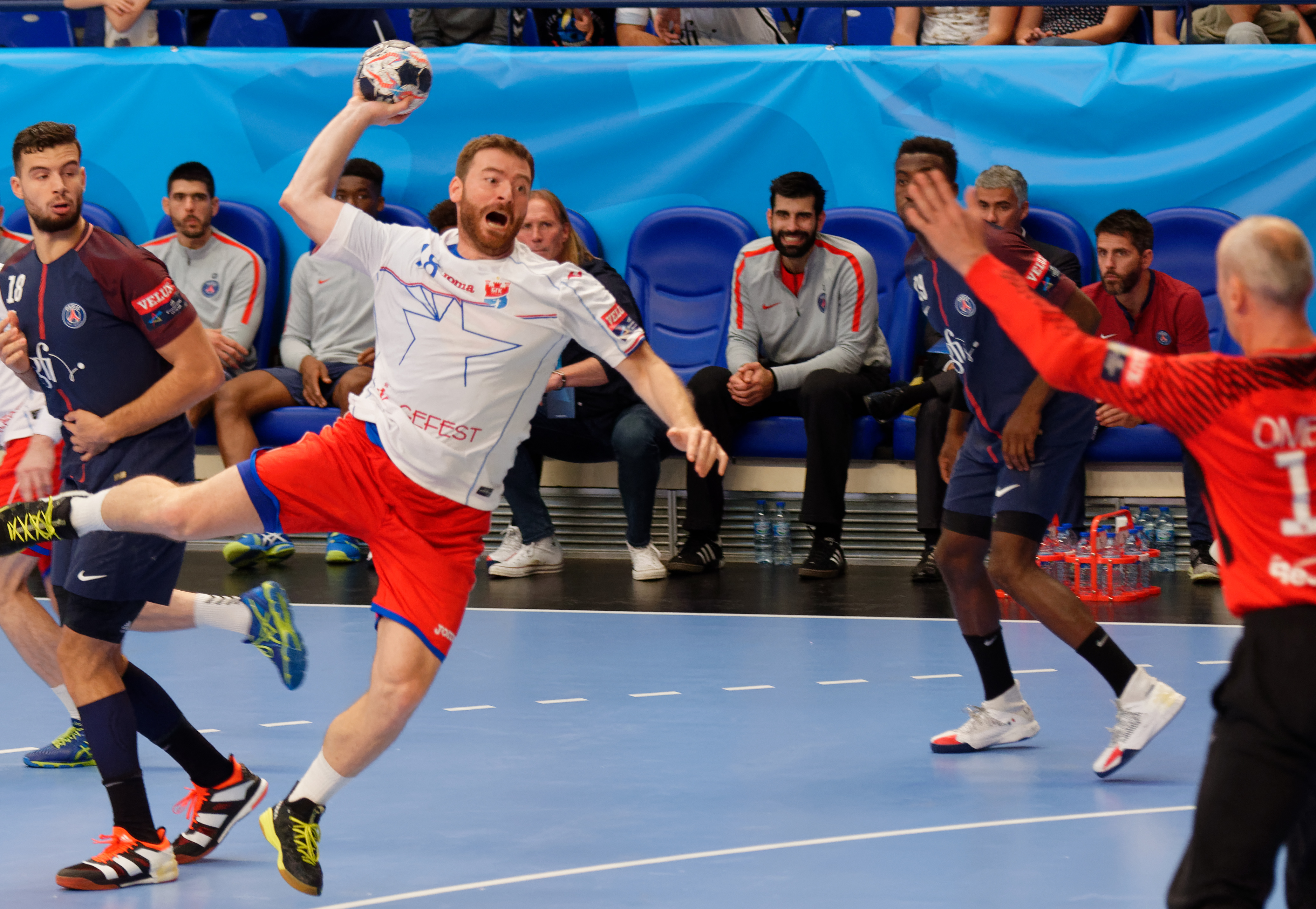 Rencontre de phase de groupe de la ligue des champions 2017/18 entre le PSG et Meshkov Brest A Coubertin le 24 septembre 2017.